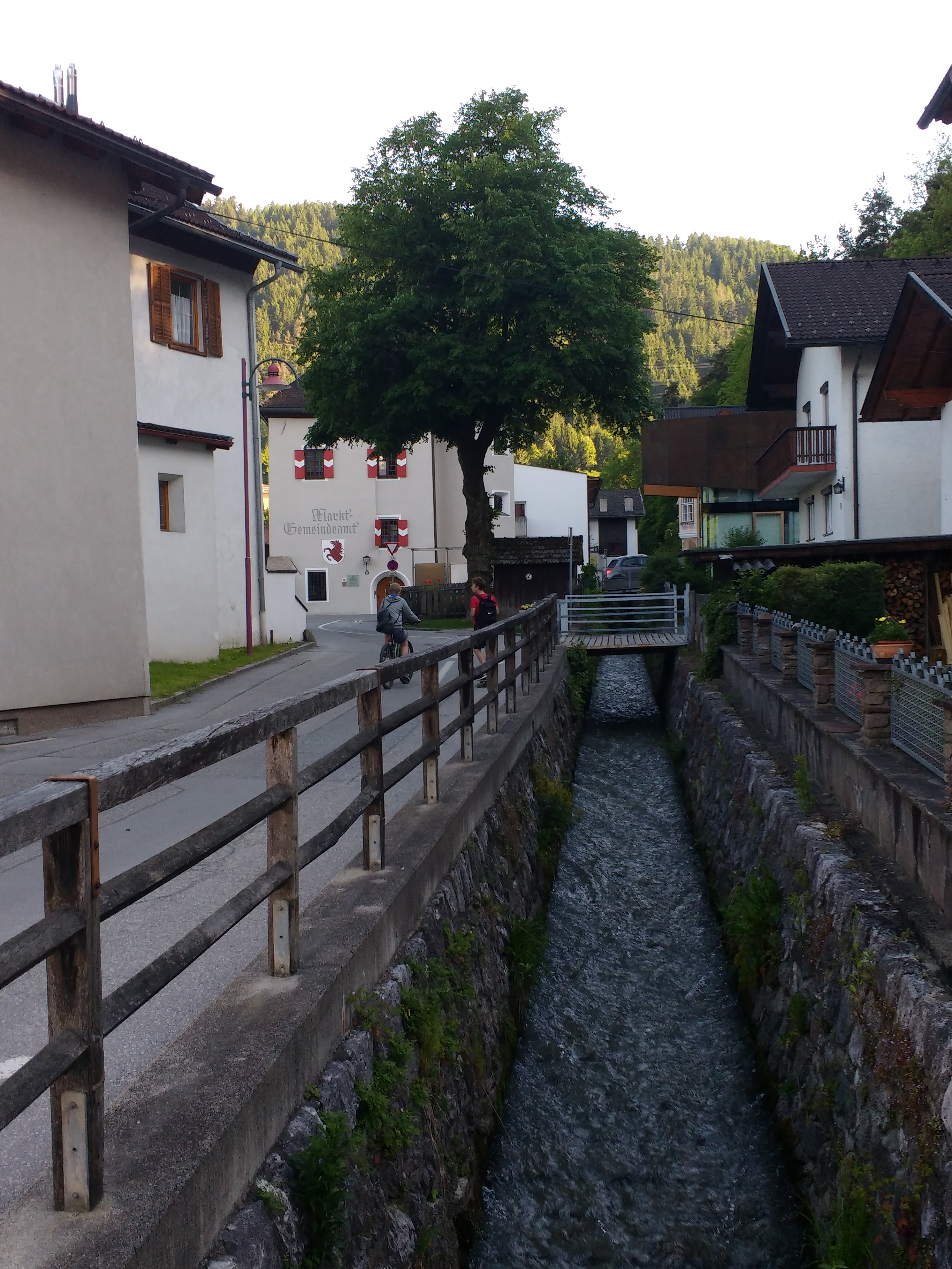 Axamer Bach in Völs